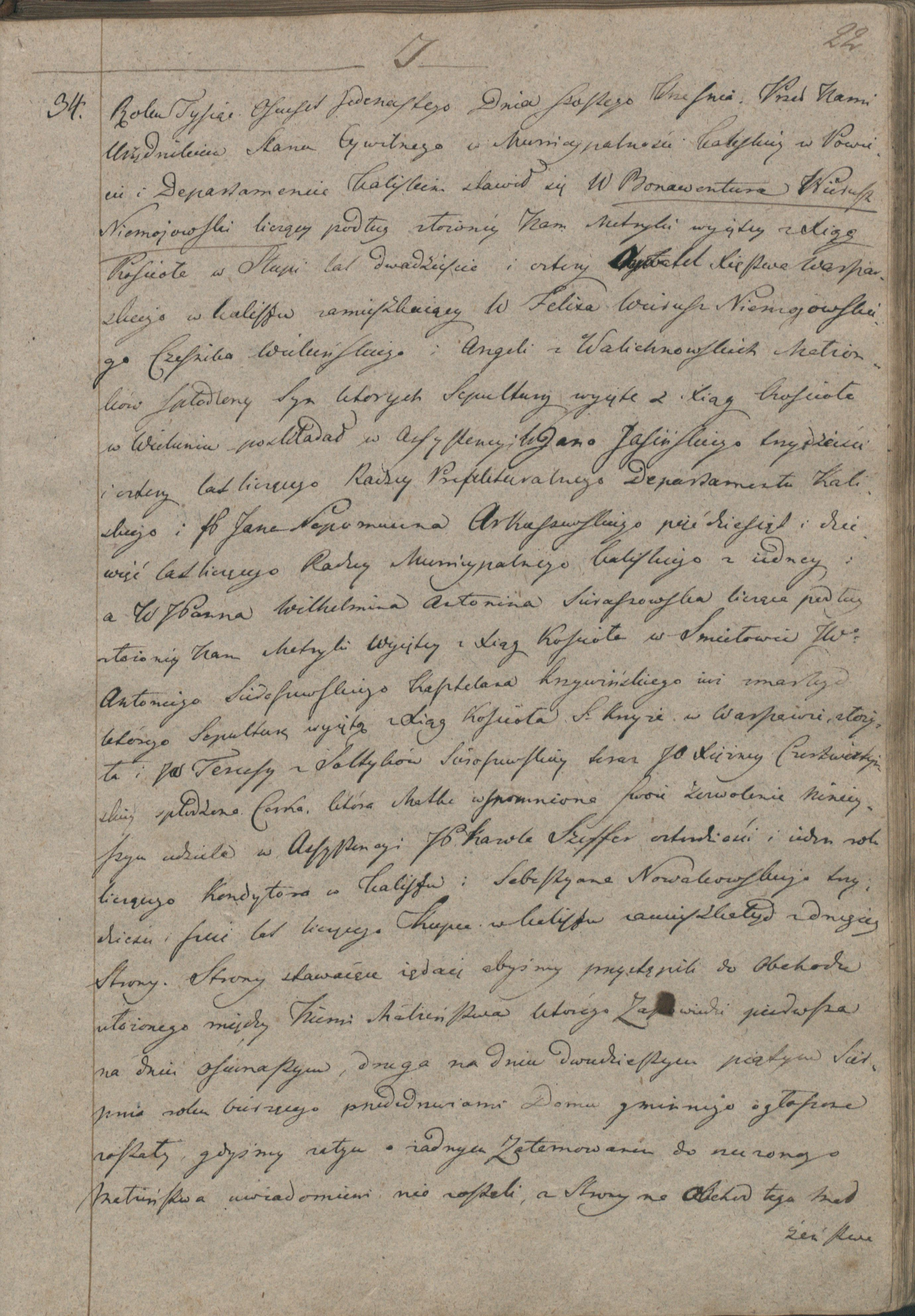 numer 34, strona 1